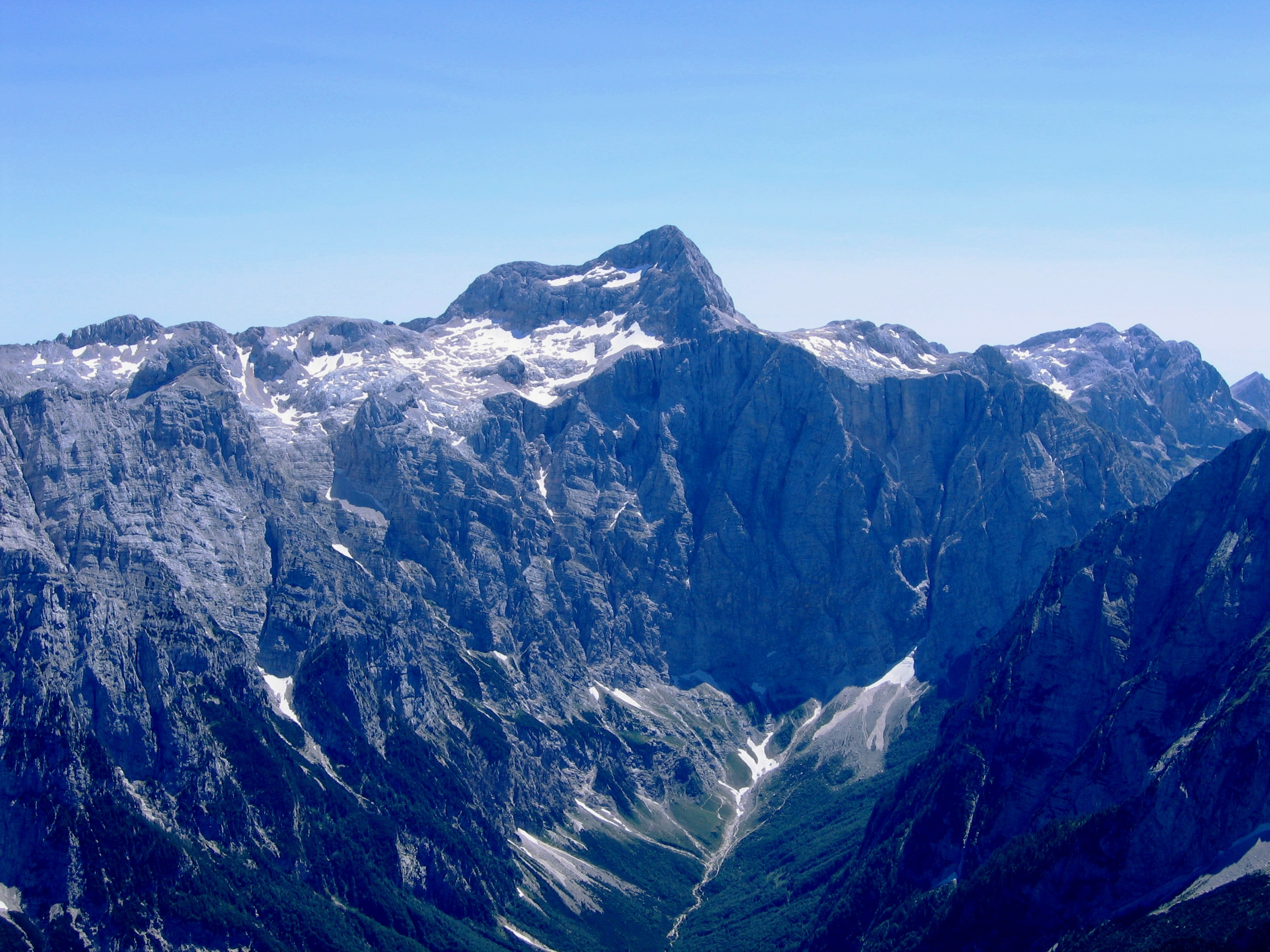 Severna stran Triglava.